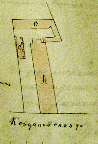 Мінск. Рэвалюцыйная. План пляца. ХІХ ст